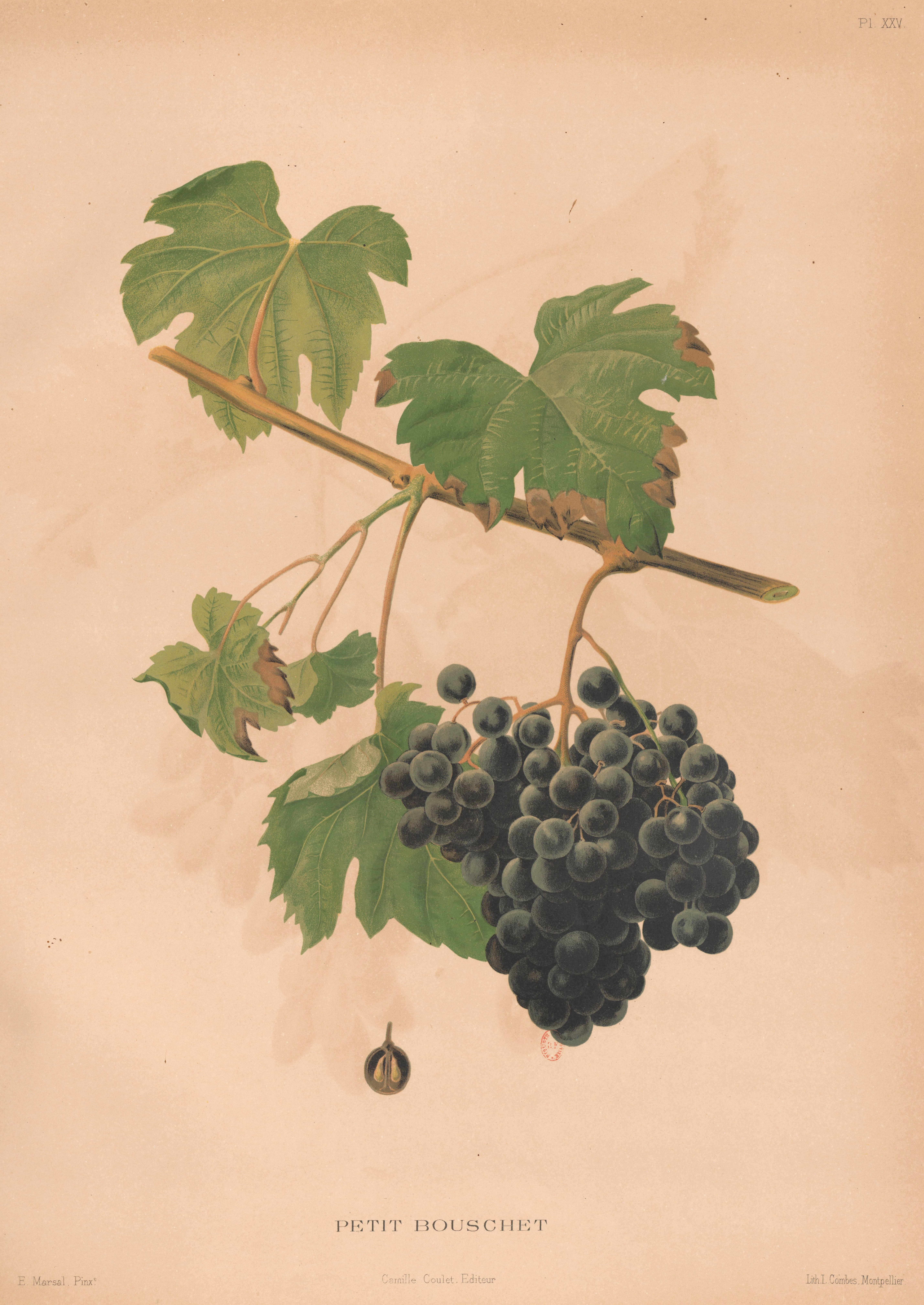 Lithographie du cépage Petit Bouschet